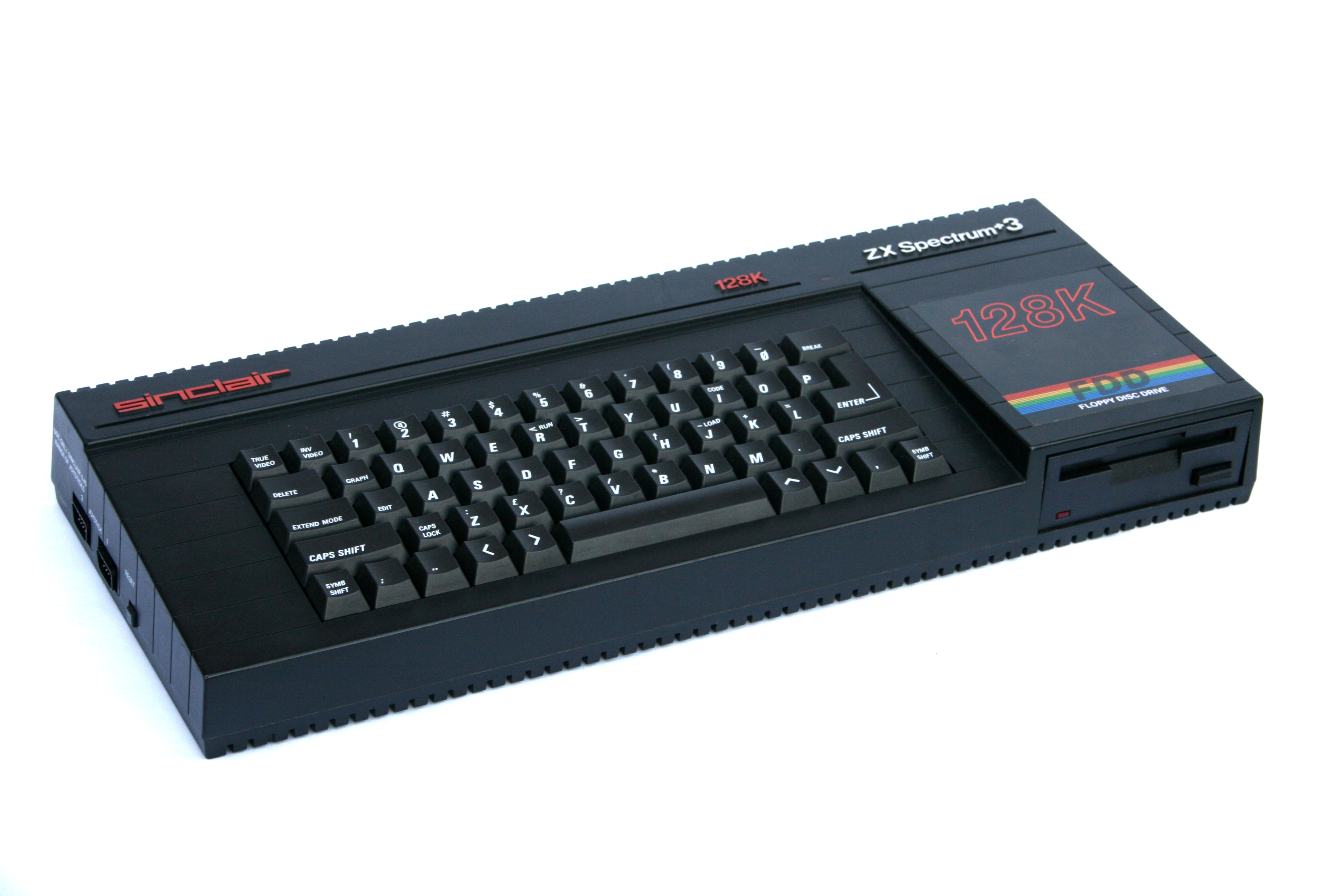 ZX Spectrum +3